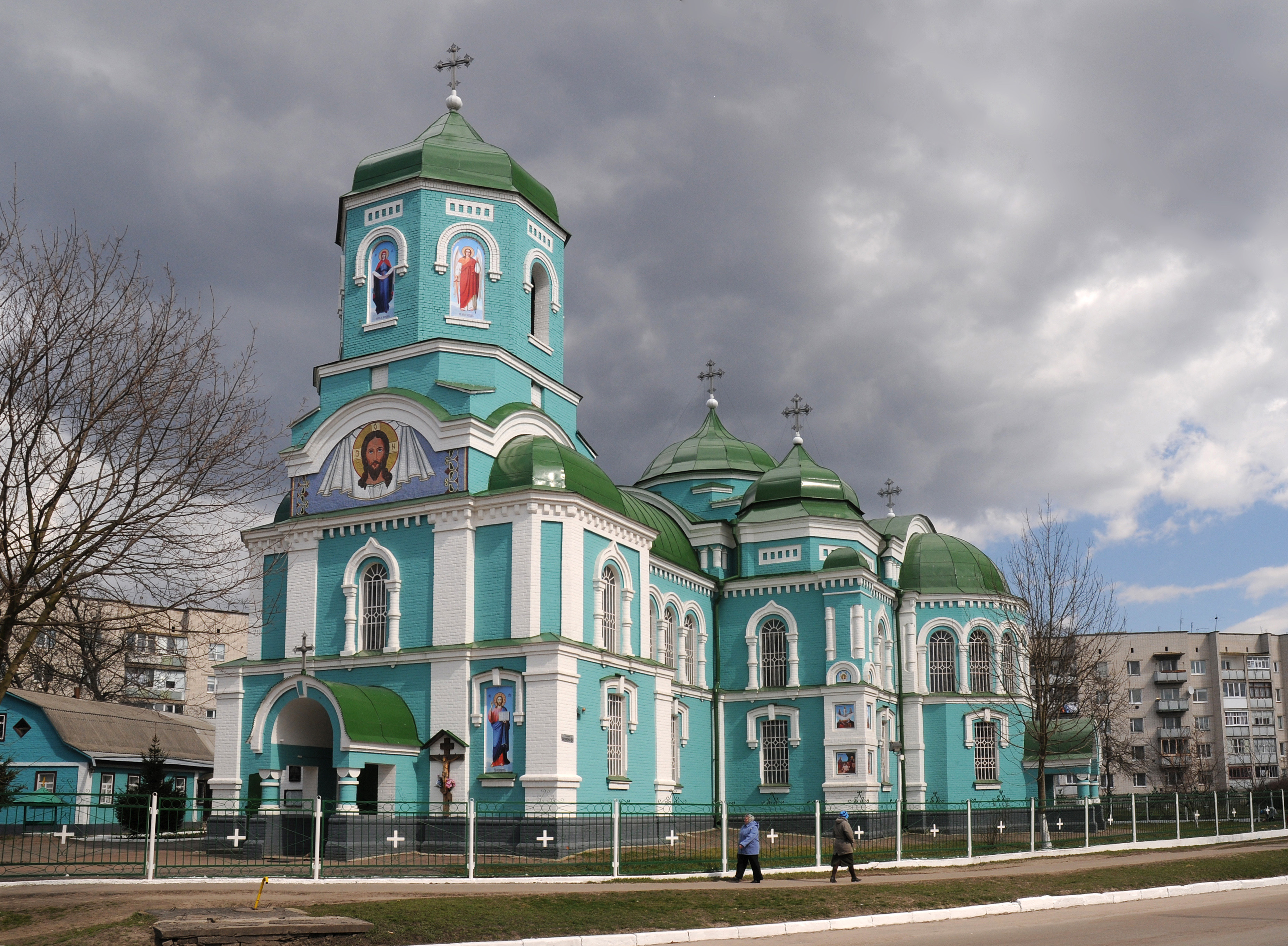 Золотоноша, Успенський собор